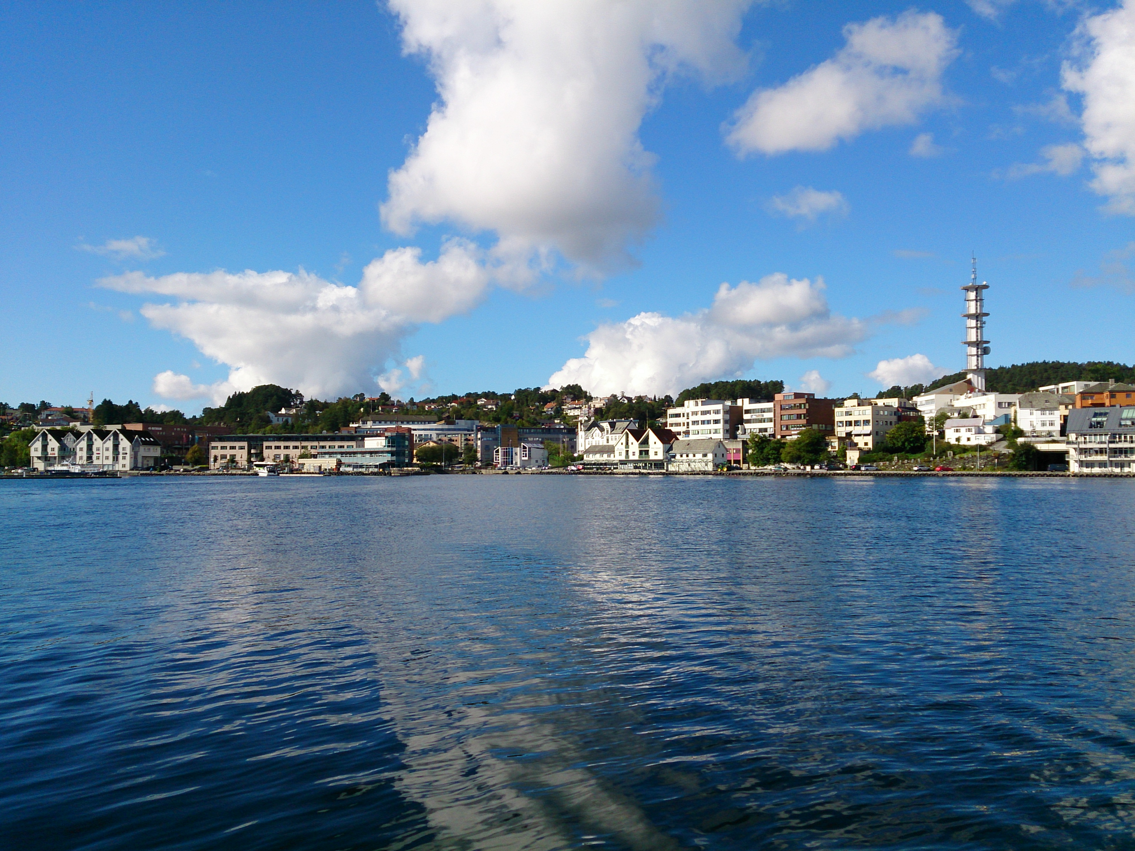 Leirvik sentrum sett fra Onarheimsparken